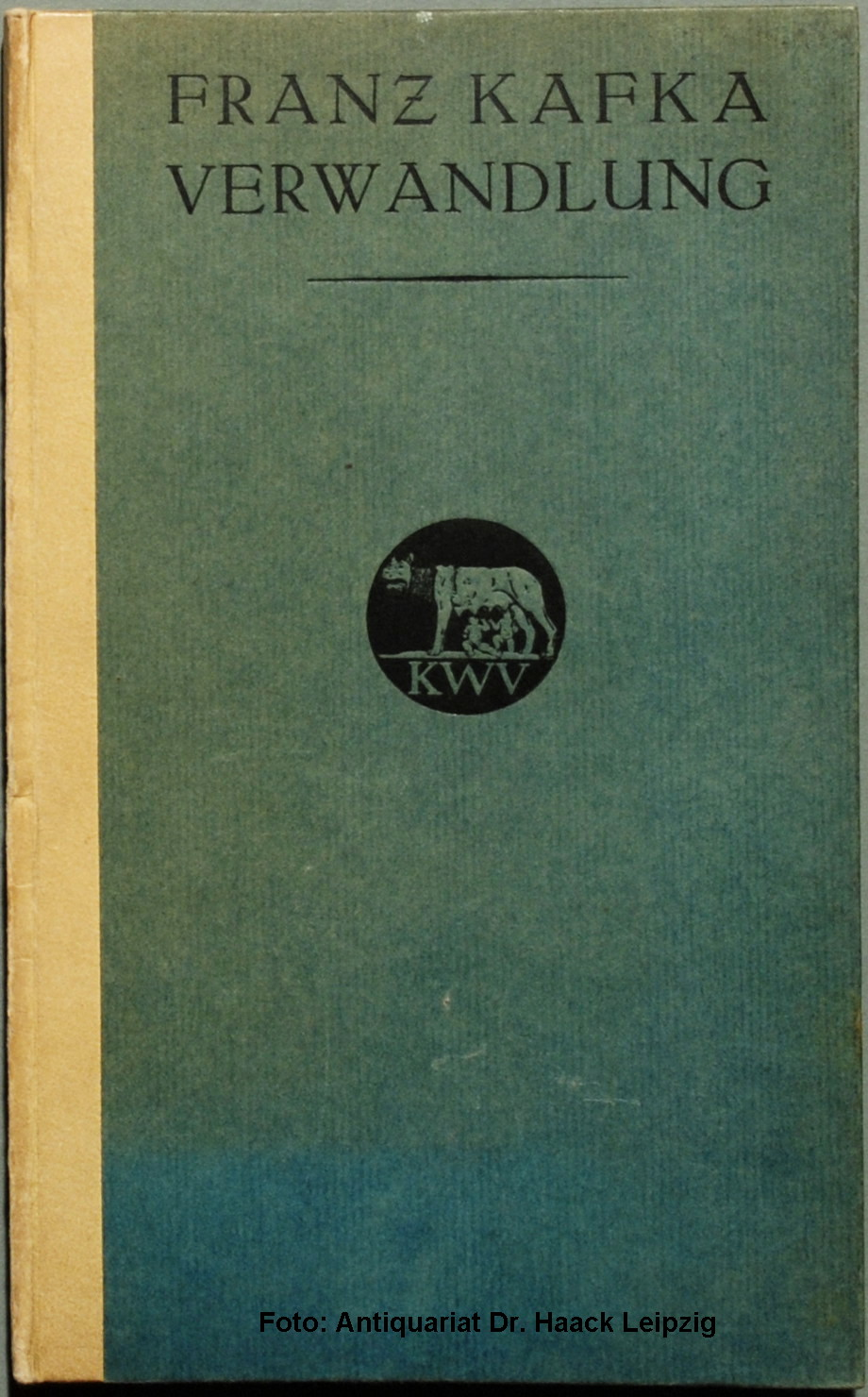 Kafka, Franz: Die Verwandlung [Erzählung] Leipzig: Kurt Wolff 1915, 72 Seiten + 1 nicht paginierte Seite + 3 Blatt; Dietz 26, Wilpert/Gühring² 3, Raabe 146.3 1.Auflage; Blauer Original-Pappband 8° mit Rückenlängstitel, Titel und Verlagssignet auf Vorderdeckel; Fadenheftung; Gedruckt bei Poeschel & Trepte in Leipzig November 1915 als Band 22/23 der Bücherei "Der jüngste Tag".